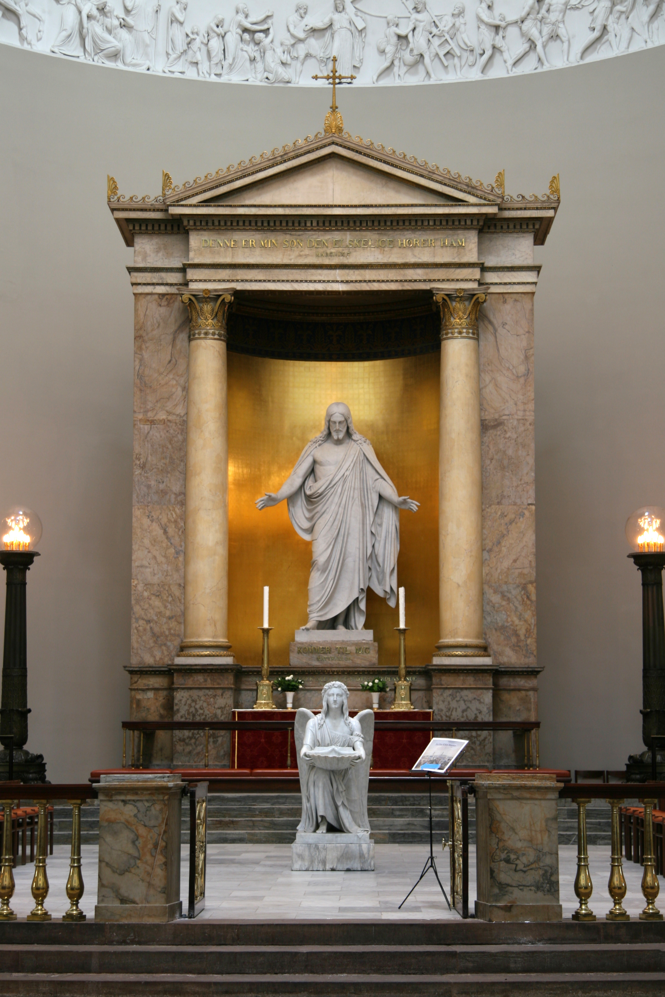 Vor Frue Kirke in Copenhagen, Denmark. The cathedral of Copenhagen. Altar.